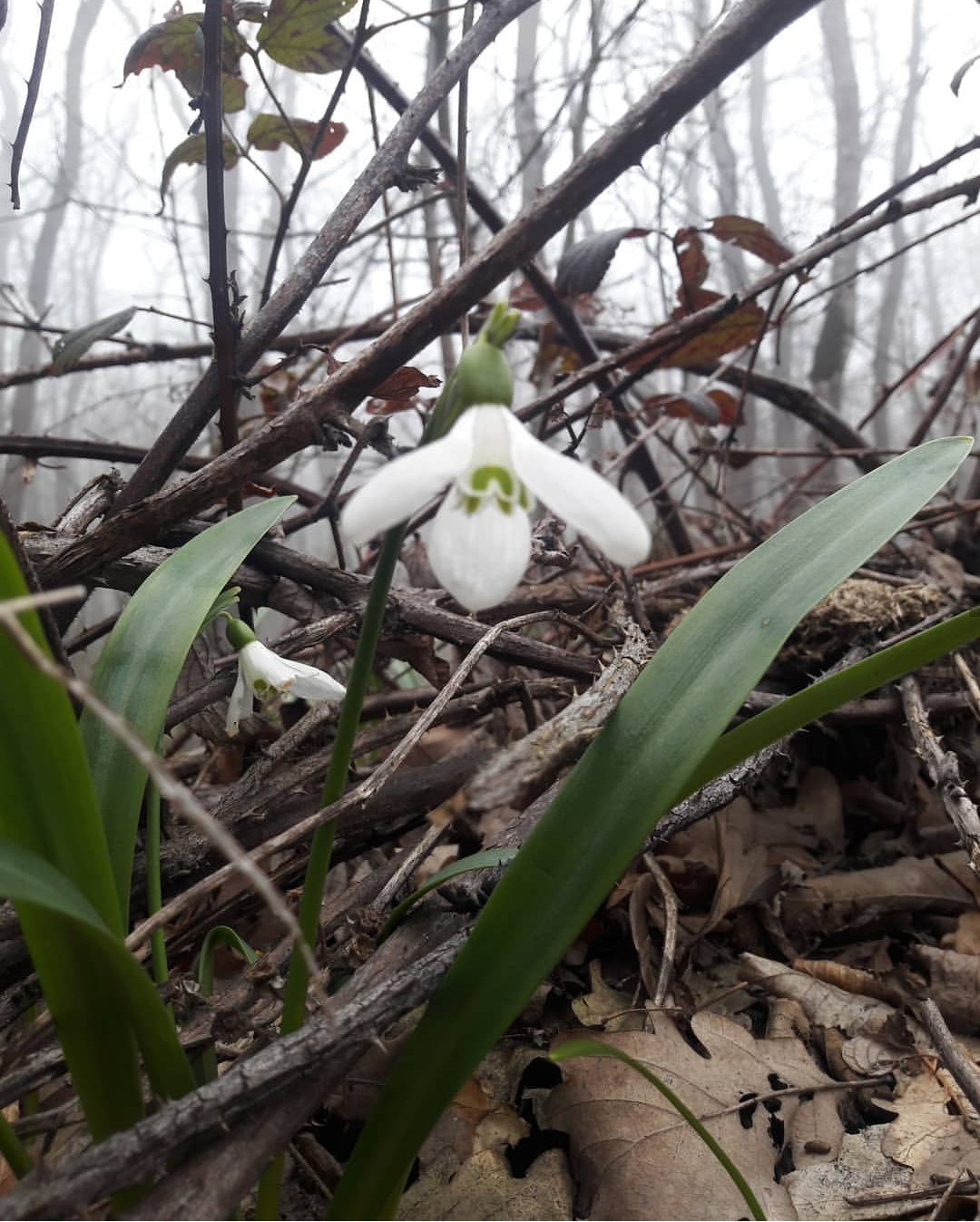 Bitki